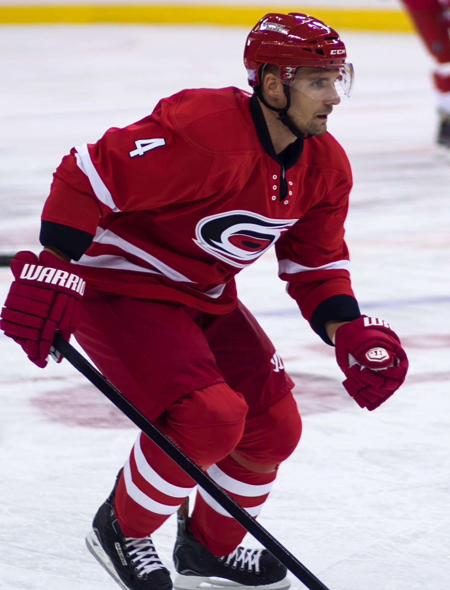 Andrej Sekera, Slovak ice hockey defenseman